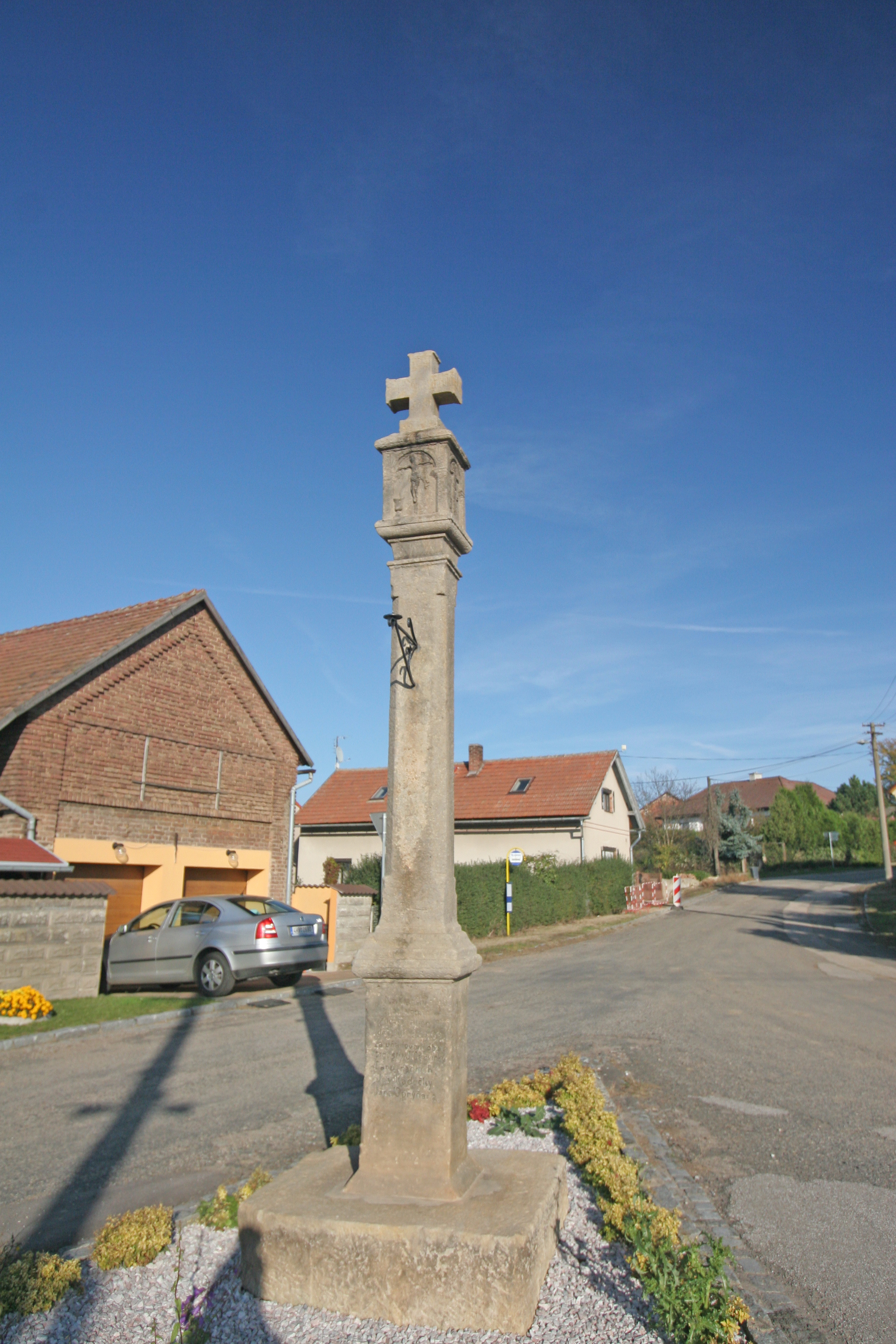 Boží muka (Benátky), náves, Benátky